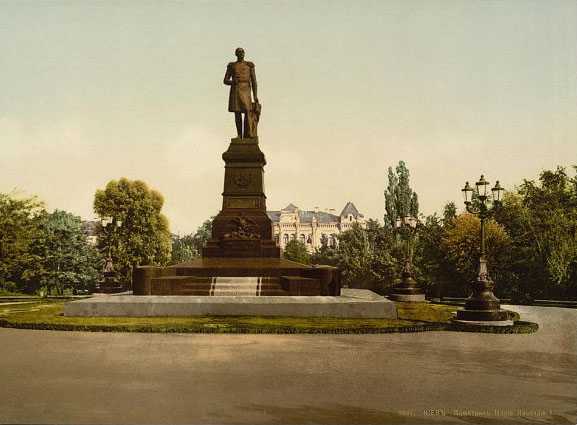 памятник Ніколаю І (навпроти Київського Університету - 1917 рік)